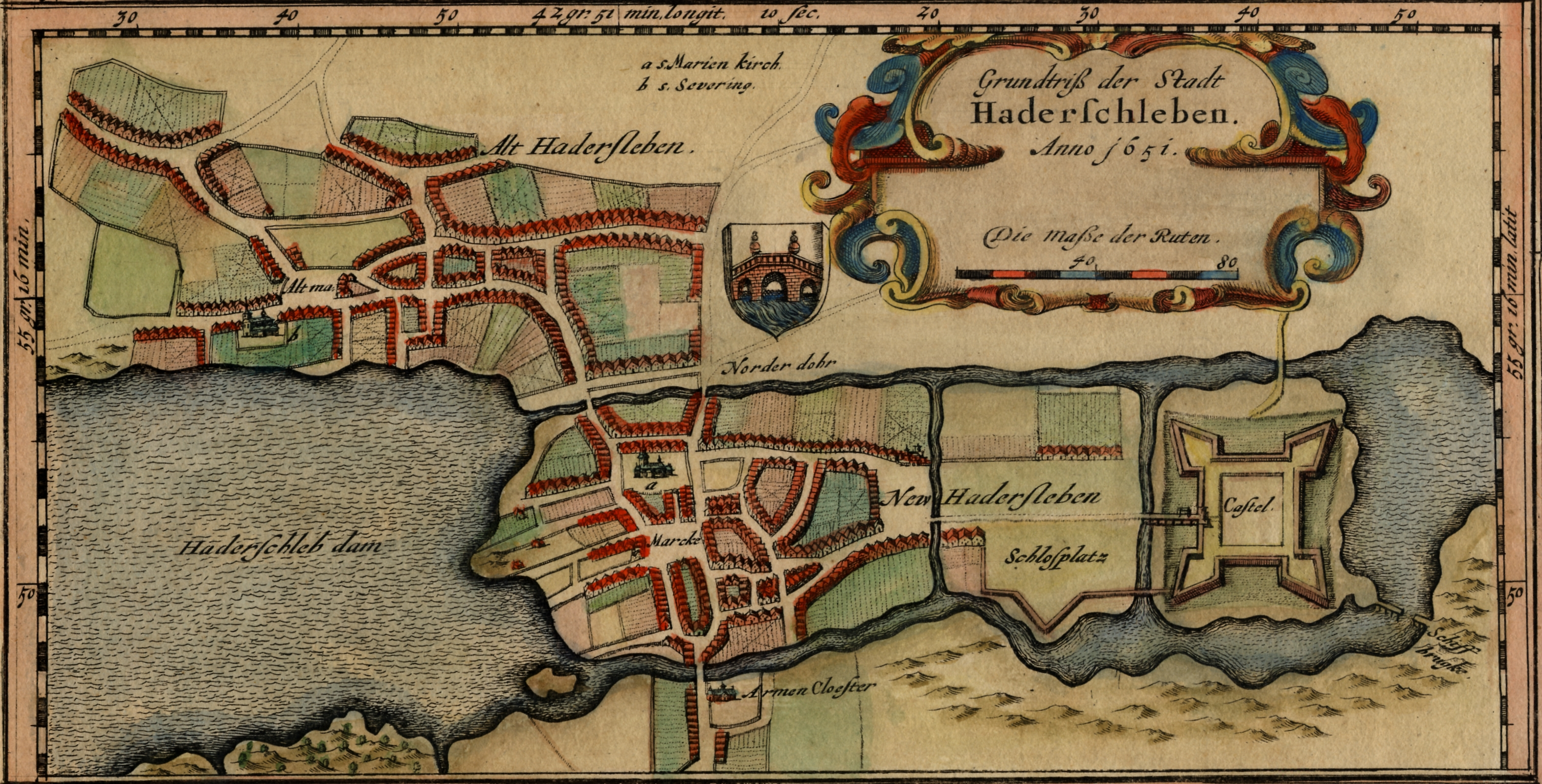 Karte von Hadersleben, Druck, handkoloriert